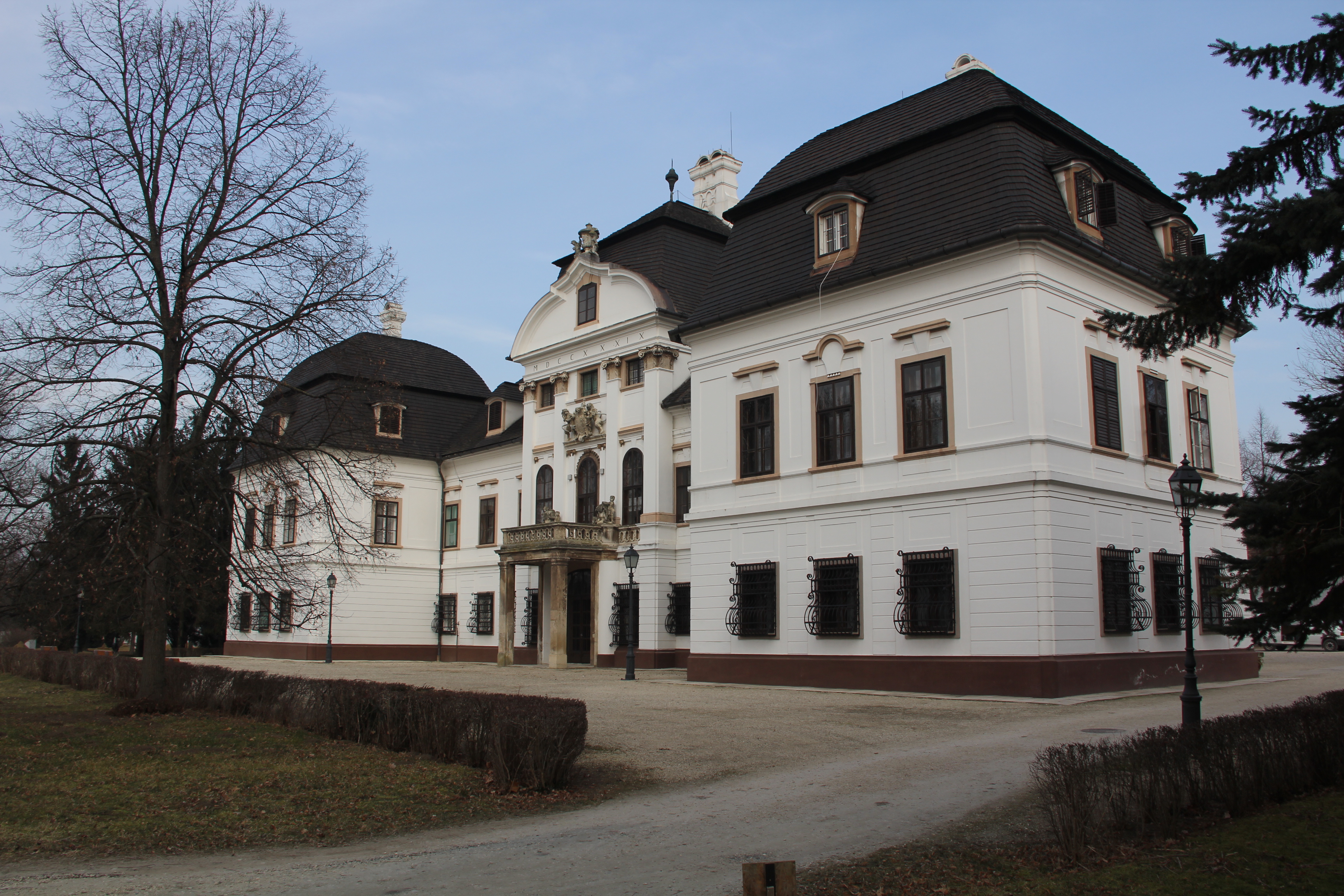 Gyülevizy-Pejacsevich-kastély, Zsira, Győr-Moson-Sopron megye This is a photo of a monument in Hungary. Identifier: 5181